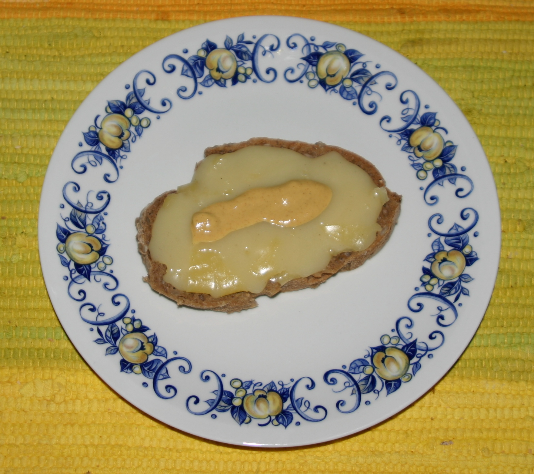 Eng Kachkéisseschmier mat engem Flapp Moschter. .